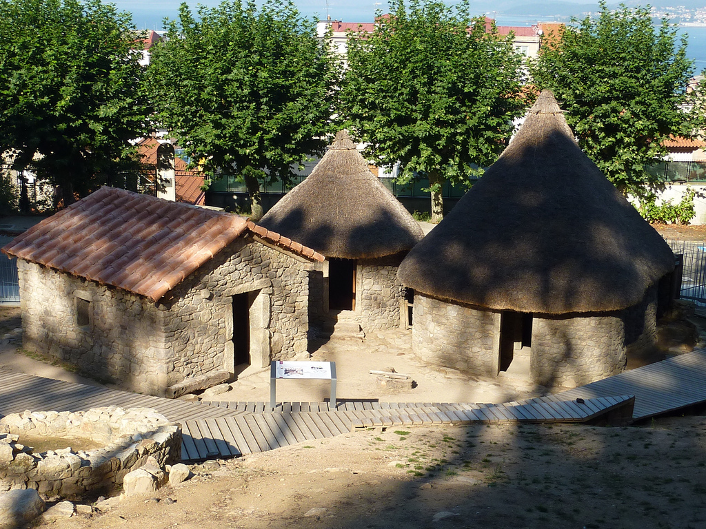 Recreación de unidad familiar castrexa del siglo I d.C.: de izquierda a derecha: vivienda/taller, almacén, y vivienda.